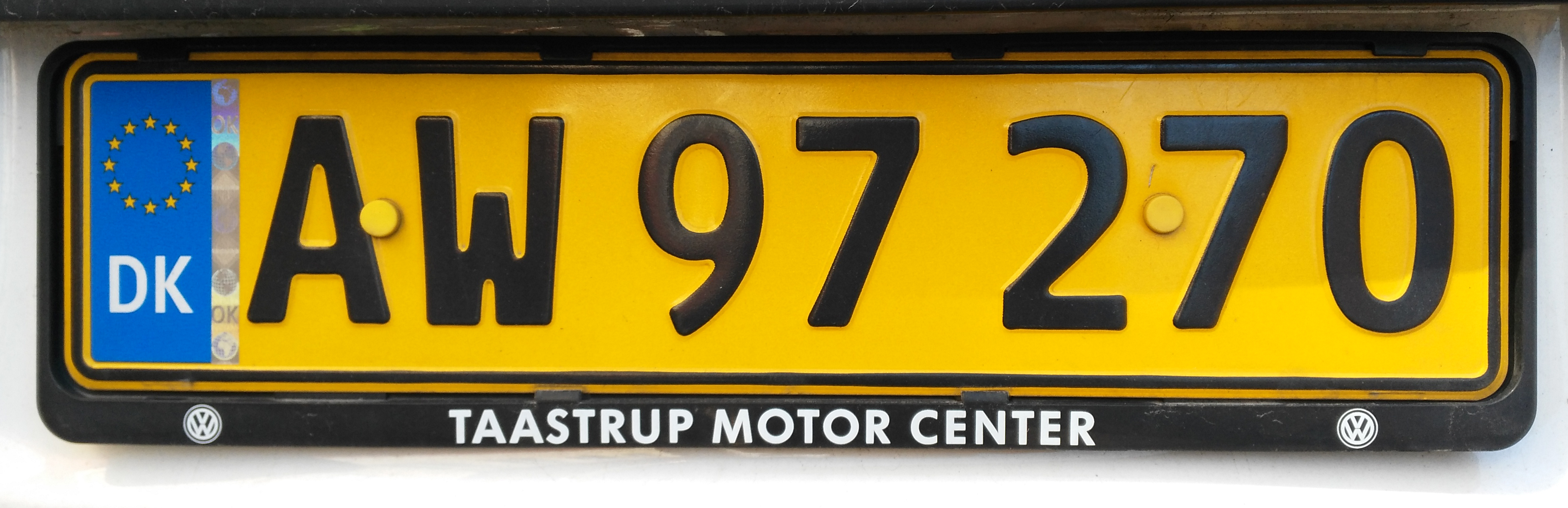 Matrícula danesa d'ús comercial.